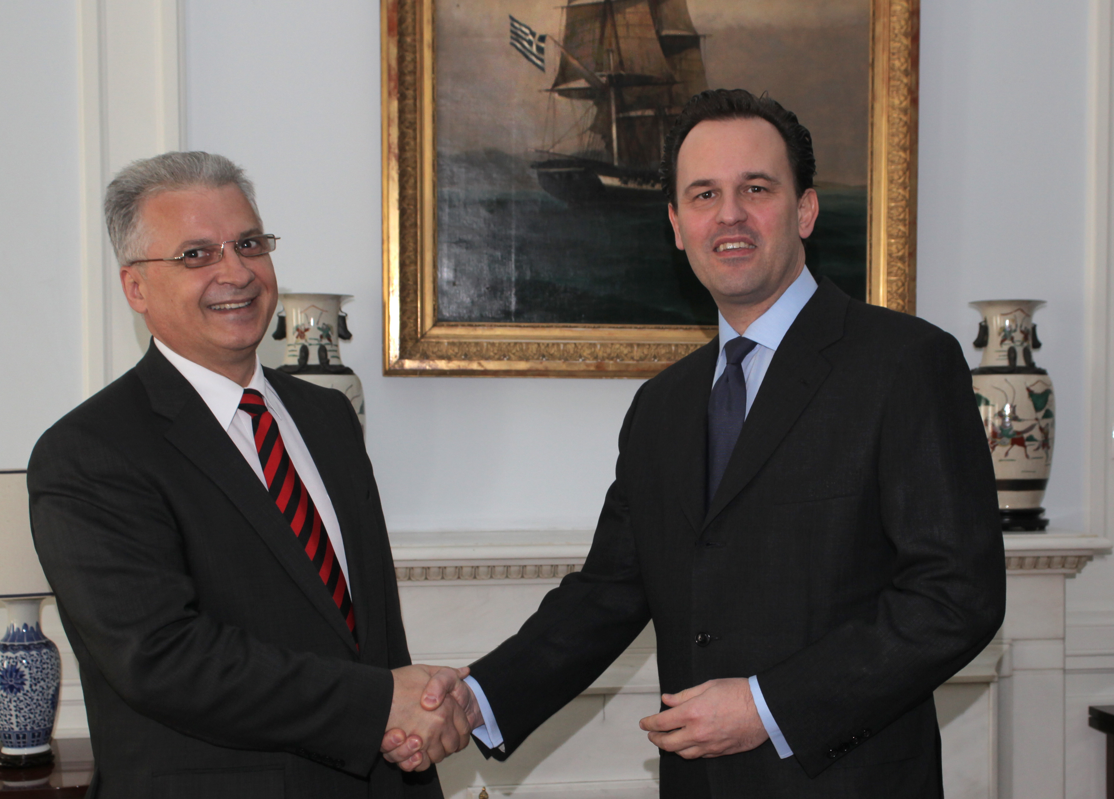 Στις 15 Μαρτίου 2011 και ώρα 15:00, ο Υπουργός Εξωτερικών Δημήτρης Δρούτσας δέχθηκε σε εθιμοτυπική συνάντηση στο Υπουργείο Εξωτερικών τον Πρέσβη της Μολδαβίας κ. Michai Balan. Foreign Minister Dimitris Droutsas received the Moldovan Ambassador to Athens, Mr. Michai Balan, in a protocol meeting at 15:00 on 15 March 2011, at the Foreign Ministry